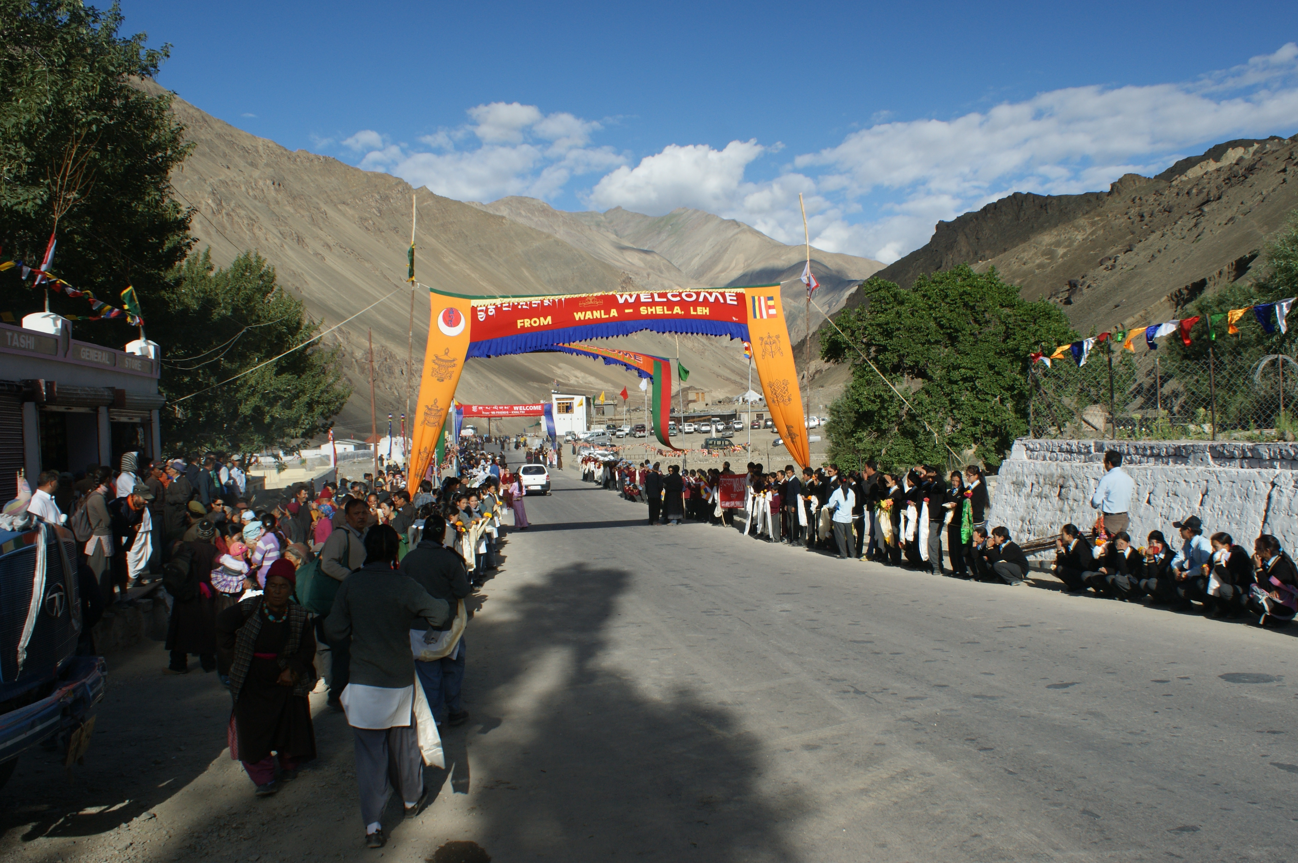 Khalsi vor einer Audienz des Dalai Lama